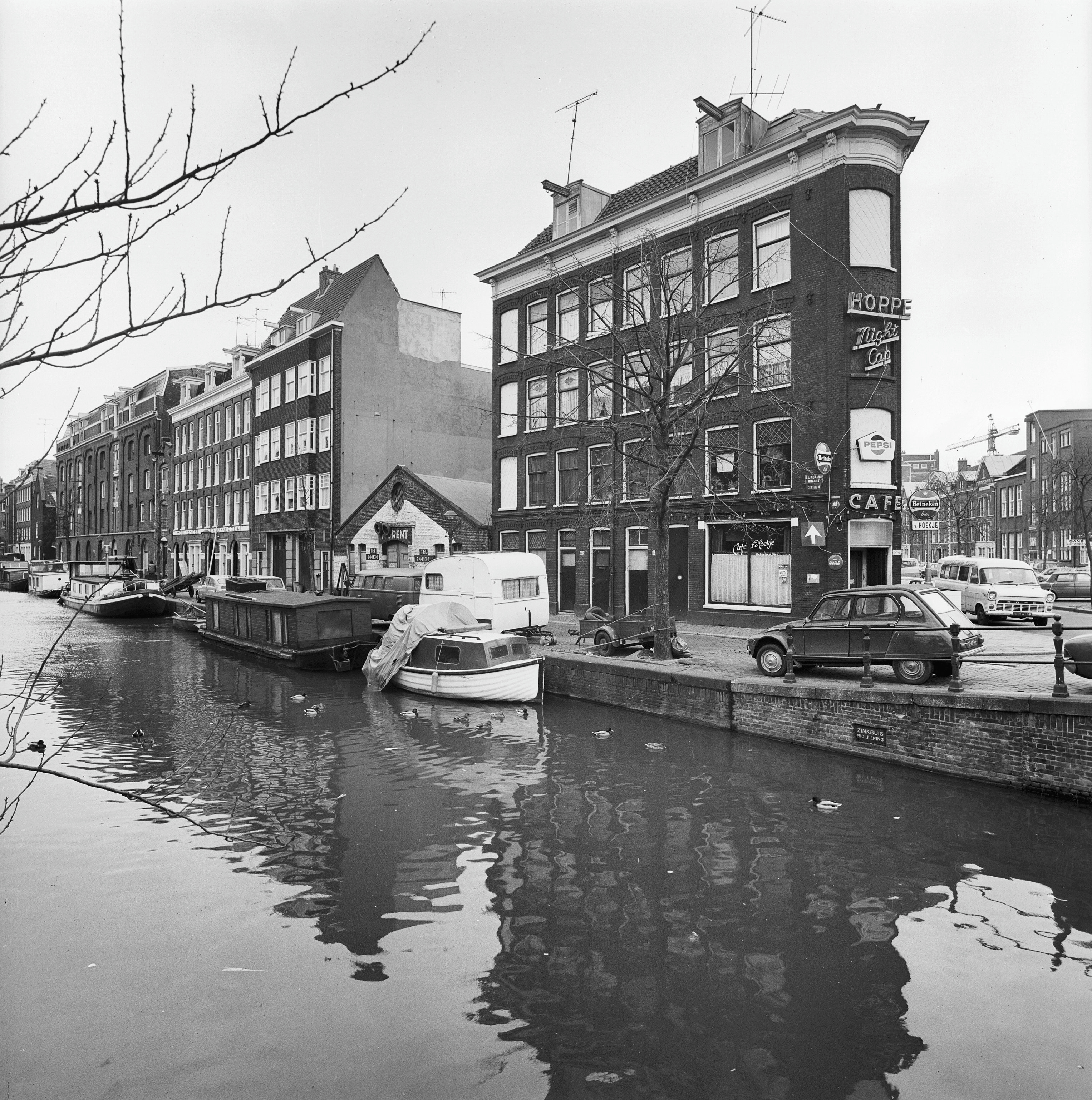 hoek Westerstraat, overzicht, gemeentelijk monument Lijnbaansgracht 61 (laagbouw) tussen hoogbouw